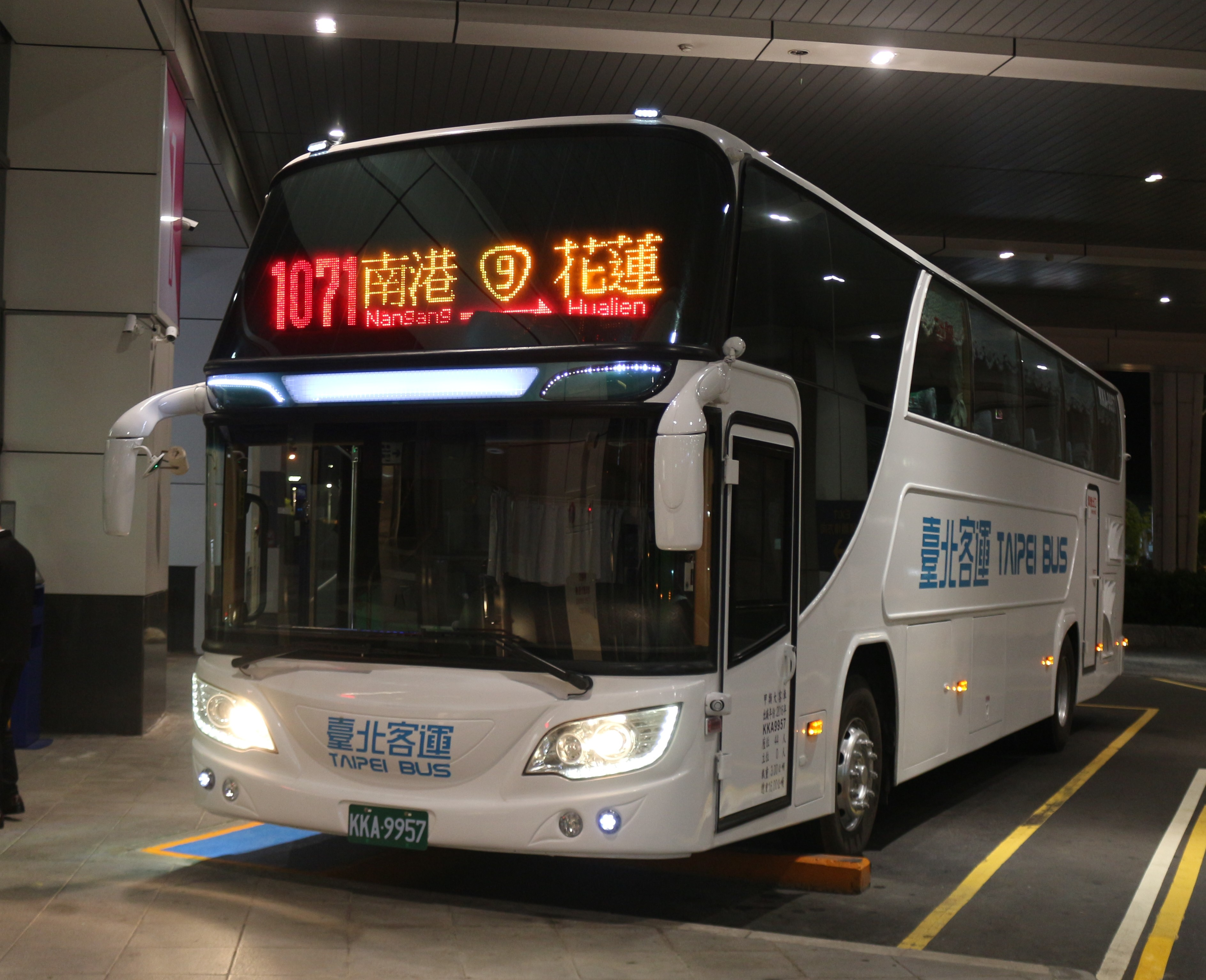 臺北客運 2016 HINO RN8JSVU-SSF KKA-9957 1071